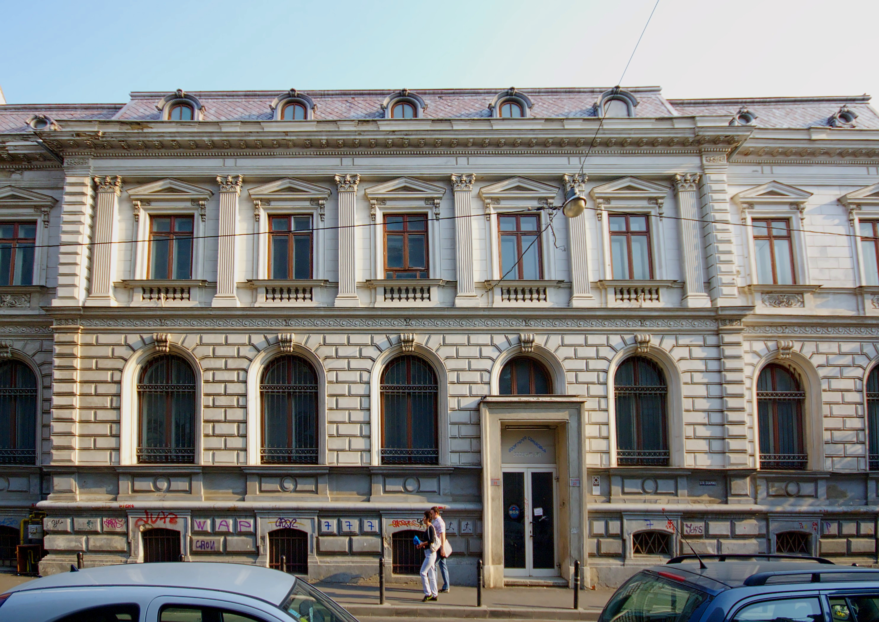 Creditul Rural, Doamnei 22